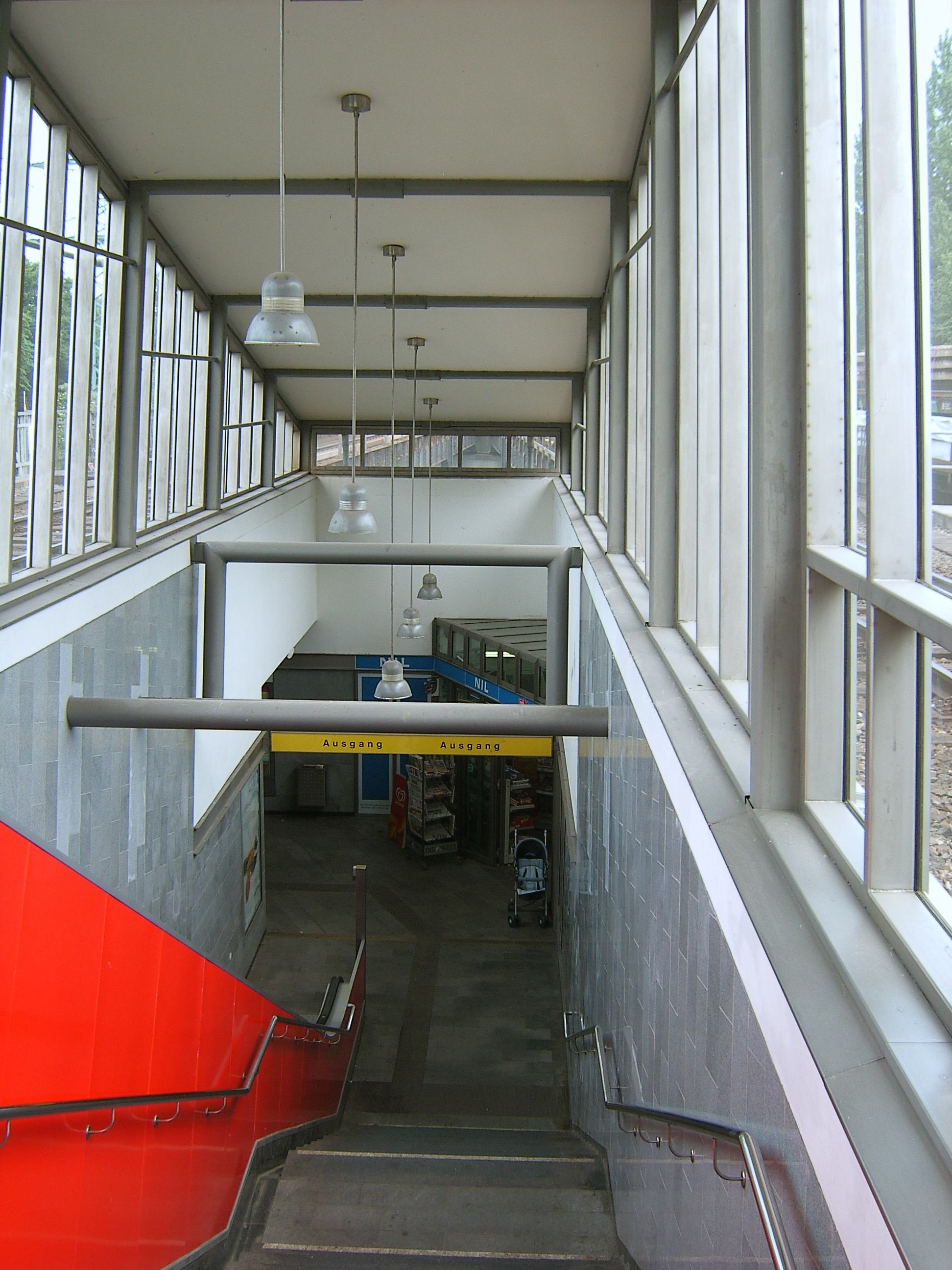 Bildbeschreibung: Hamburg, U-Bahnstation Alsterdorf, Treppe Fotograf: selbst Datum: 14.6.2006